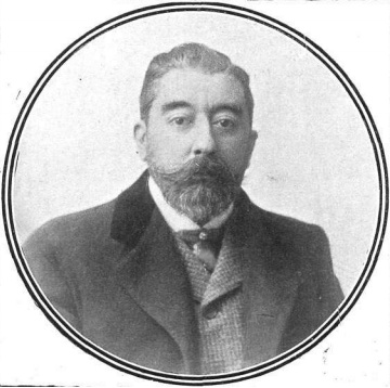 D. José Roig y Bergadá., obra del fotógrafo Manuel Compañy, recogido en la revista española Actualidades (1908).